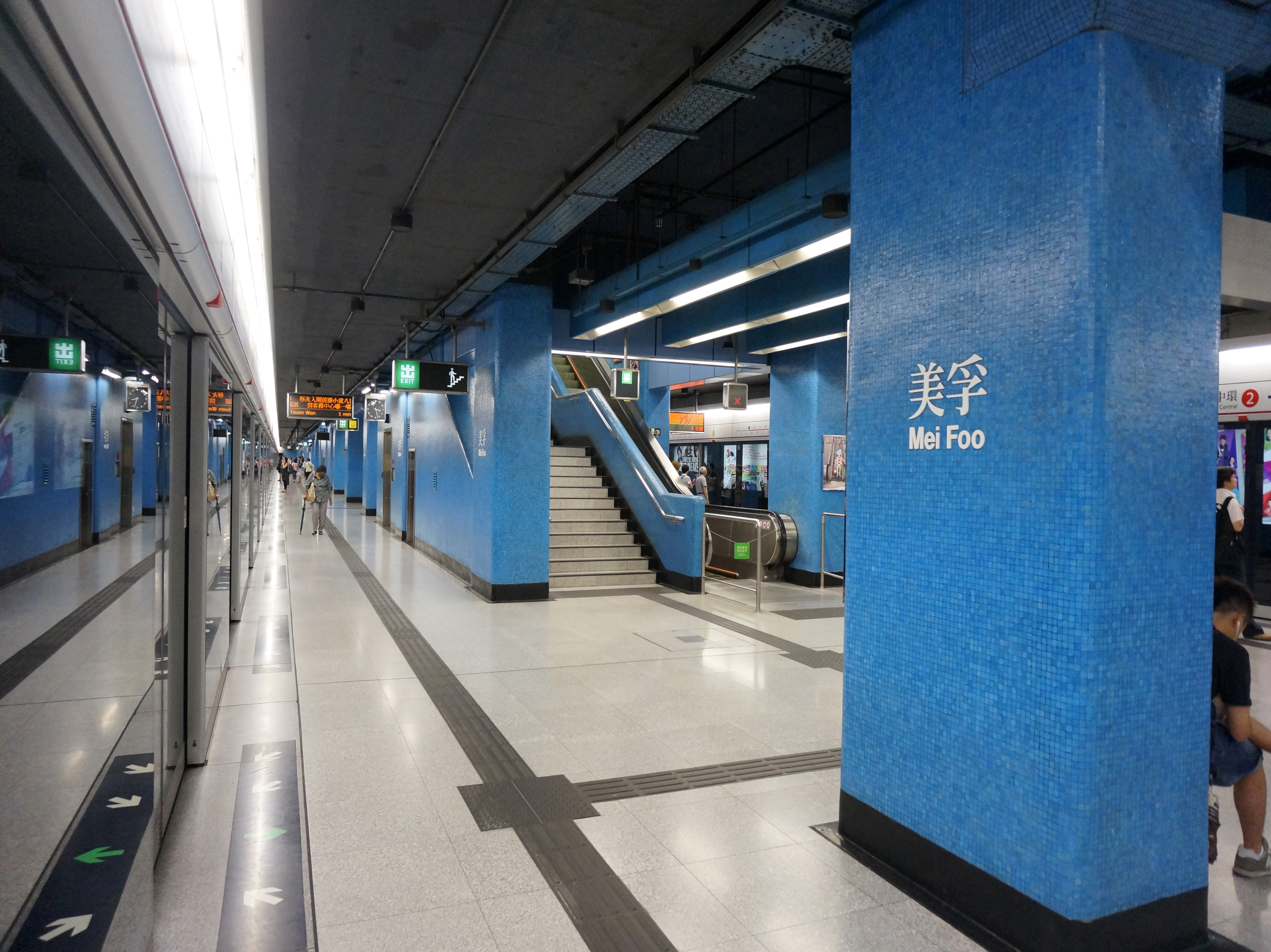 港鐵美孚站月台